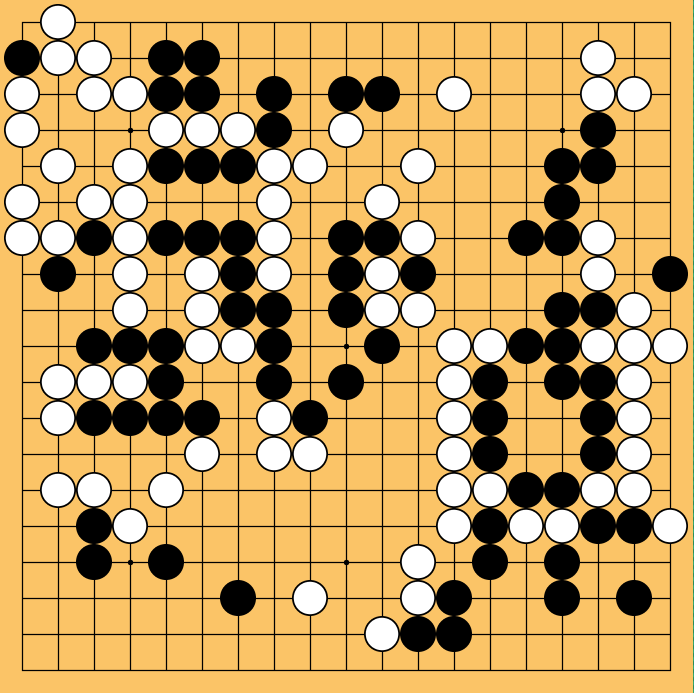 Го Сэйгэн (белые) против Китани Минору